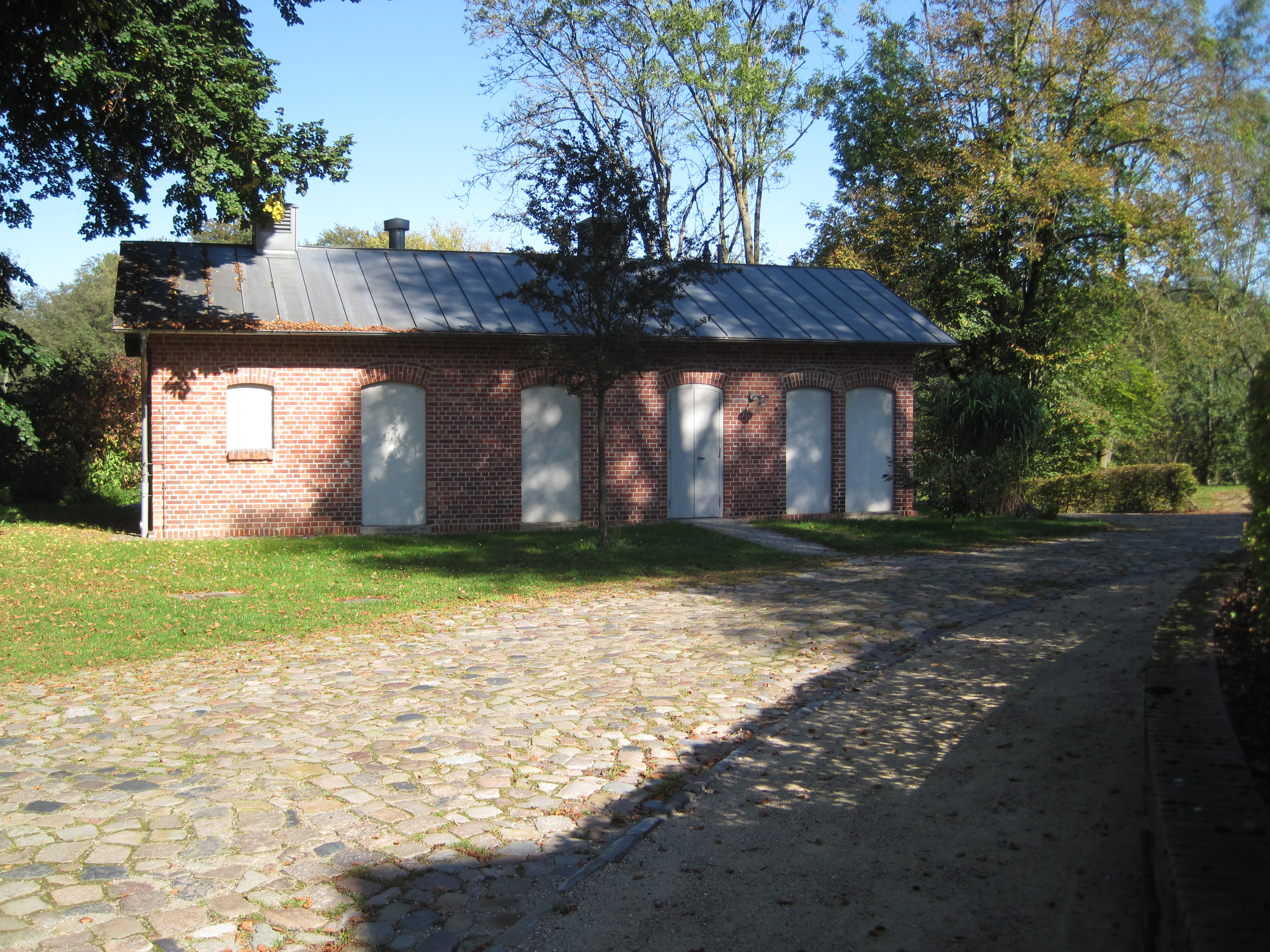 Ehemaliges Toilettenhäuschen am Bahnhof von Friedrichsruh, heute Archivgebäude der Otto-von-Bismarck-Stiftung